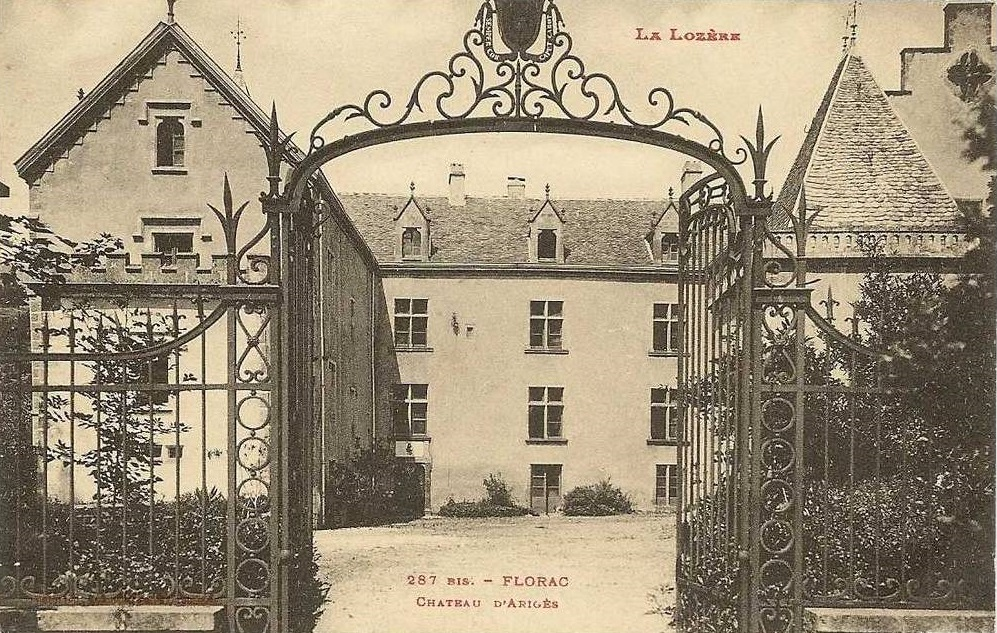 La cour du château au début du XXème